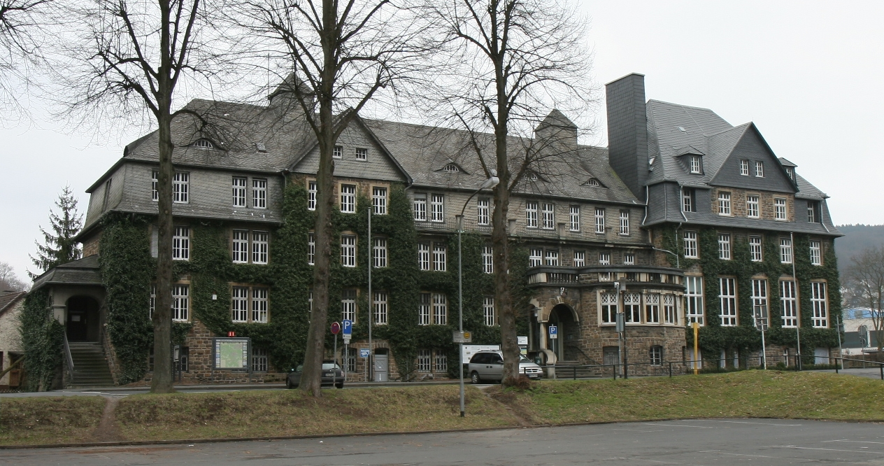 Rathaus in Werdohl. Erbaut 1912/1913, Neobarock, Bruchstein mit Werksteingliederung und Schieferdach. Zunächst Ledigenheim, dann Bürogebäude der Firma Kugel & Berg. Seit 1928 Rathaus. Denkmal.